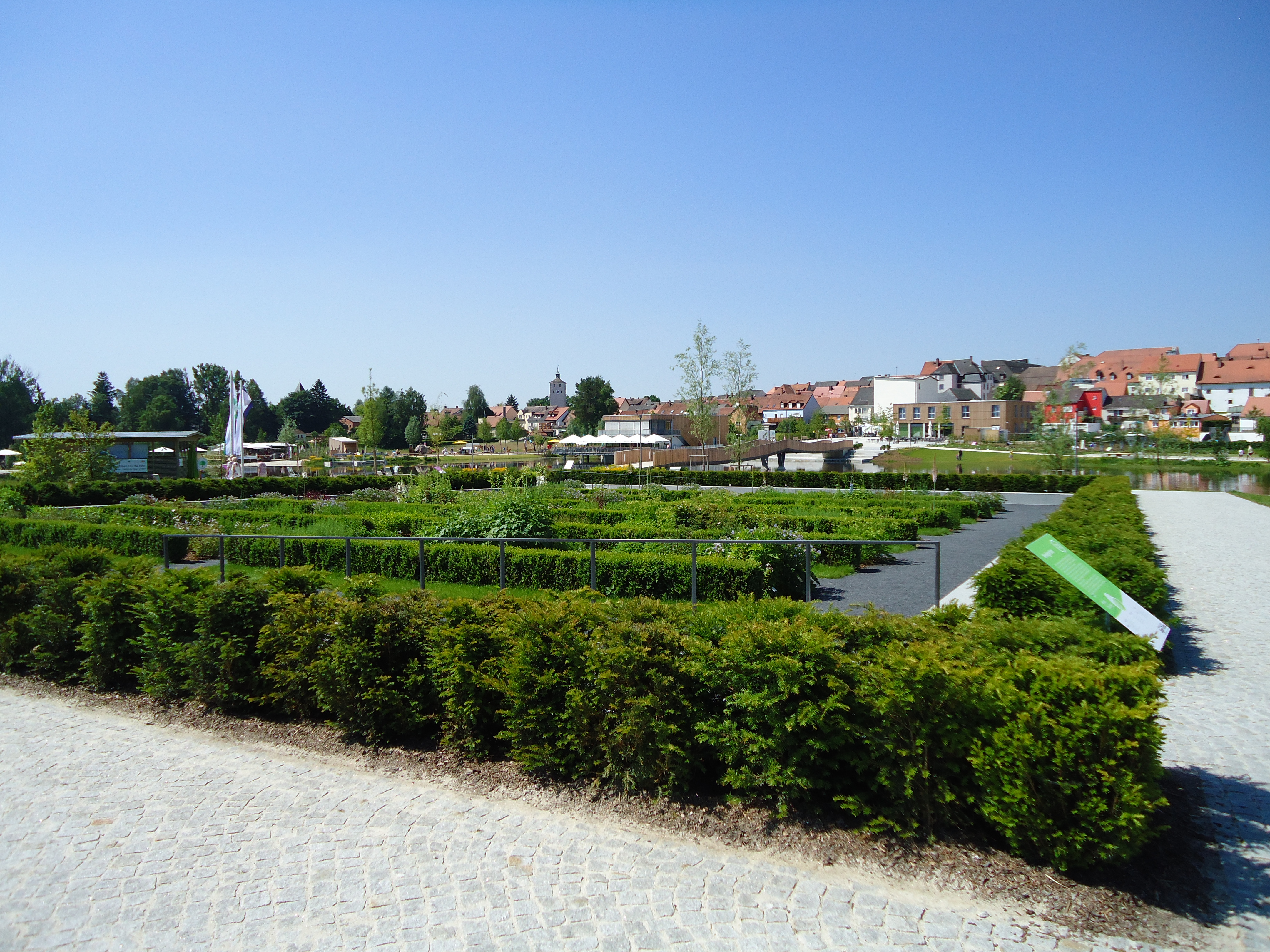 Landesgartenschau Tirschenreuth 2013 - Senkgarten